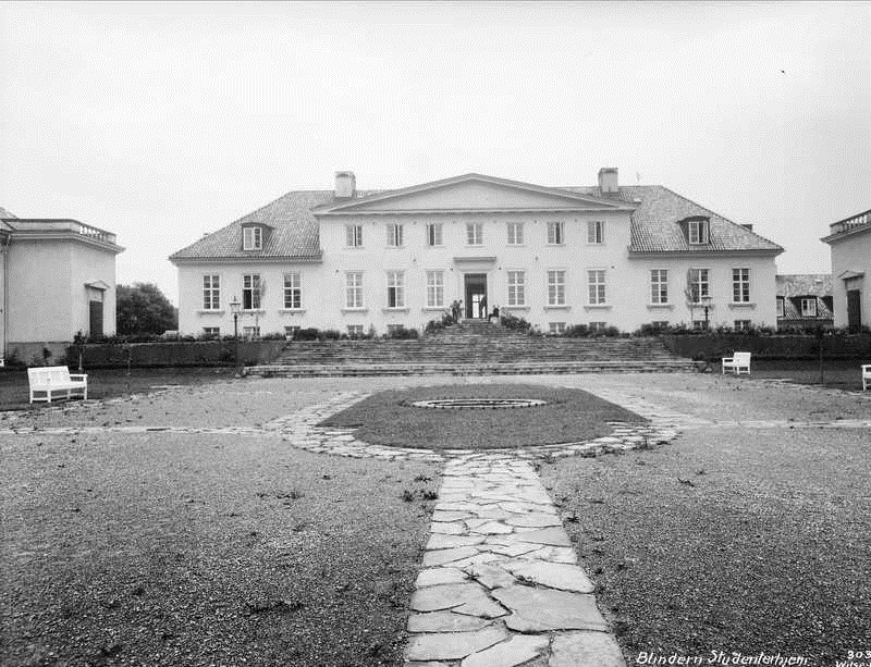 Blindern studenthjem